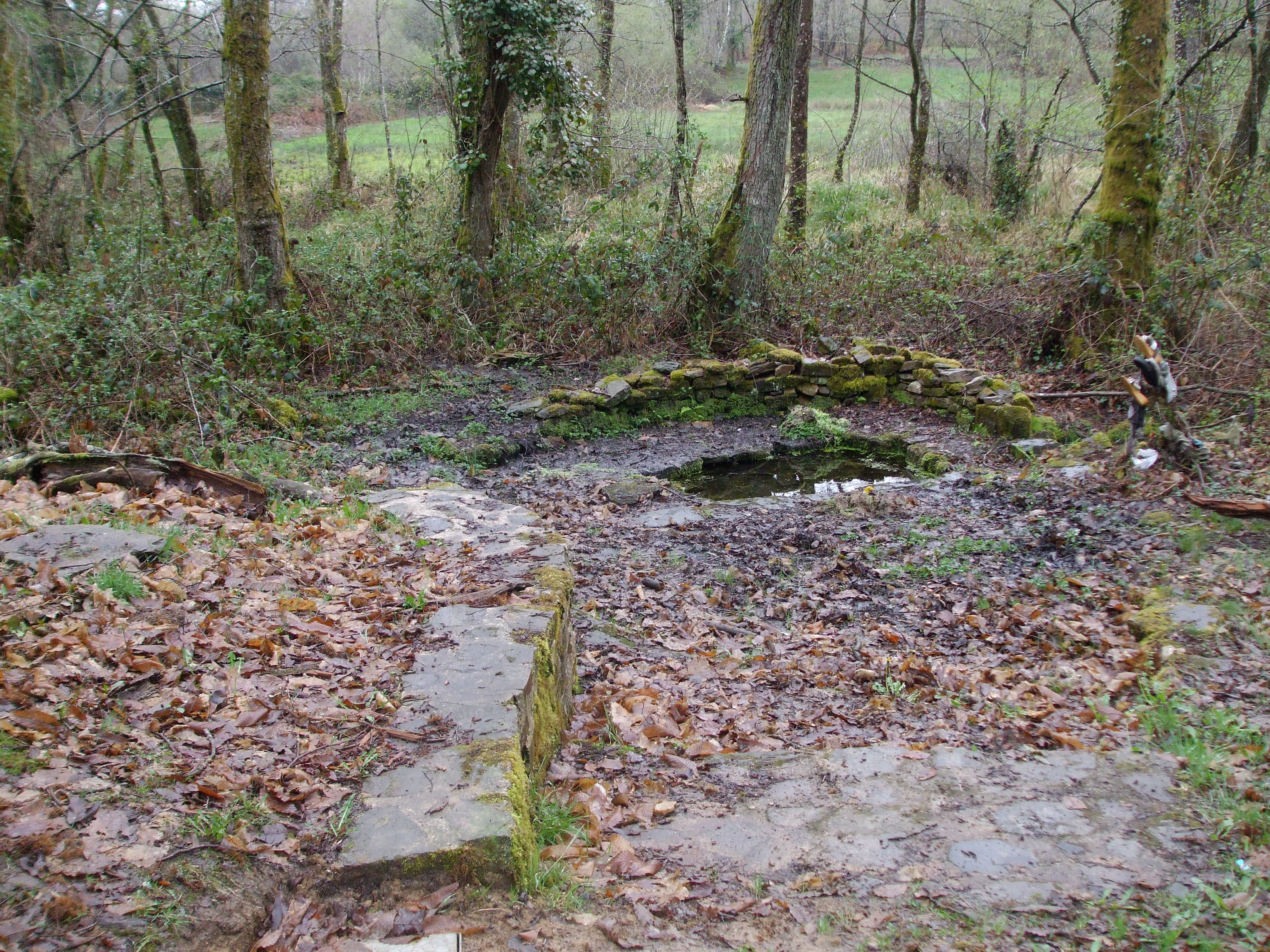 Fontaine à dévotion; bonne fontaine de La Mazaurie, Cussac, Haute-Vienne, France